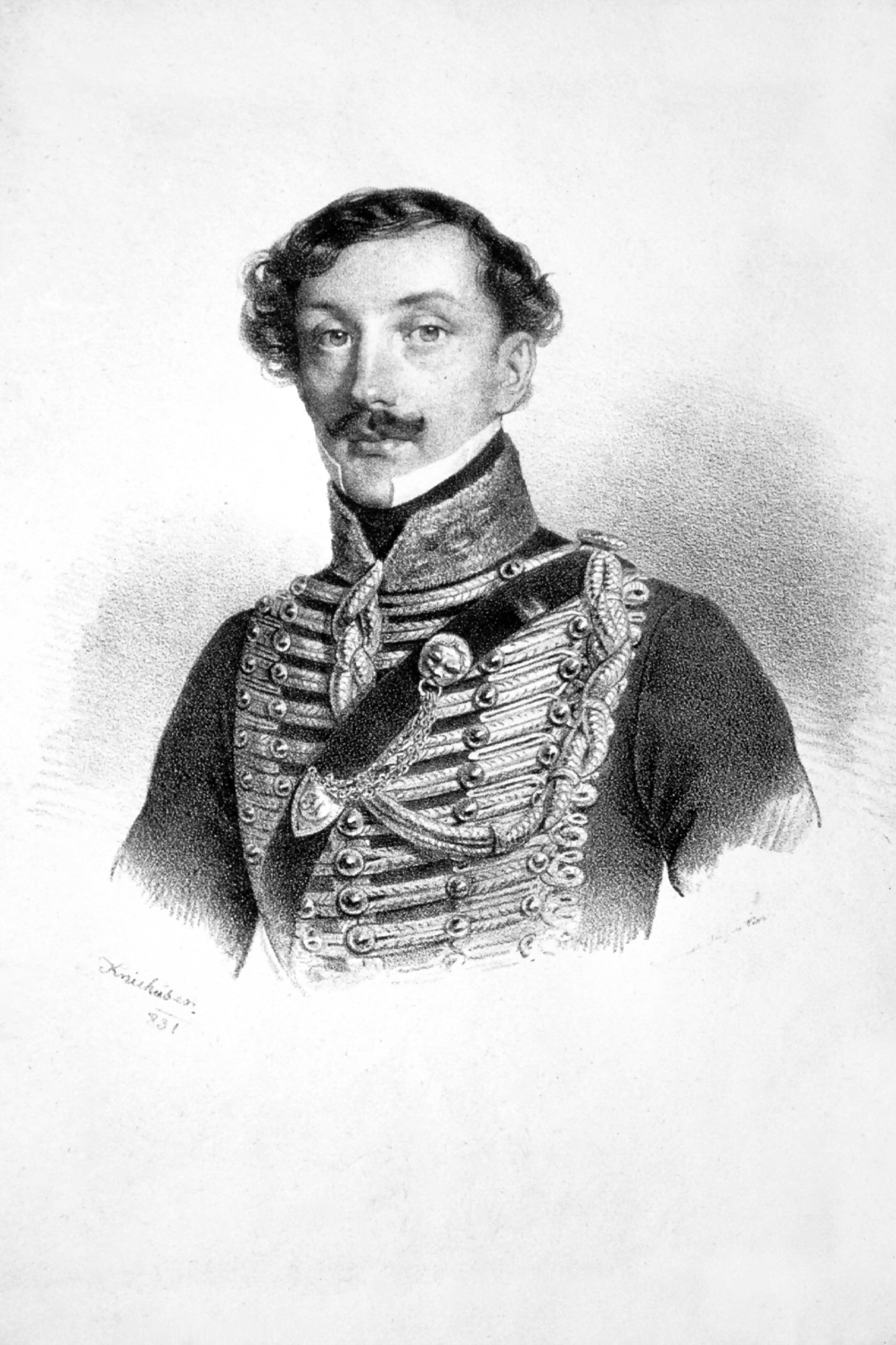 Ernst Kiss von Ittebe und Elemér (1800-1849), ungarischer General der Revolution 1848/49.